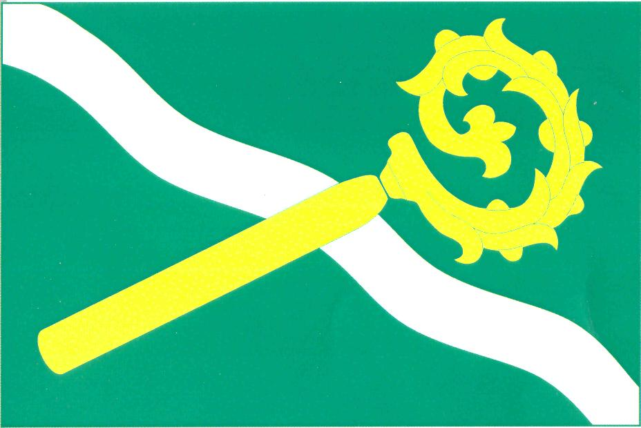 Vlajka obce Dlouhá Ves (okres Havlíčkův Brod)